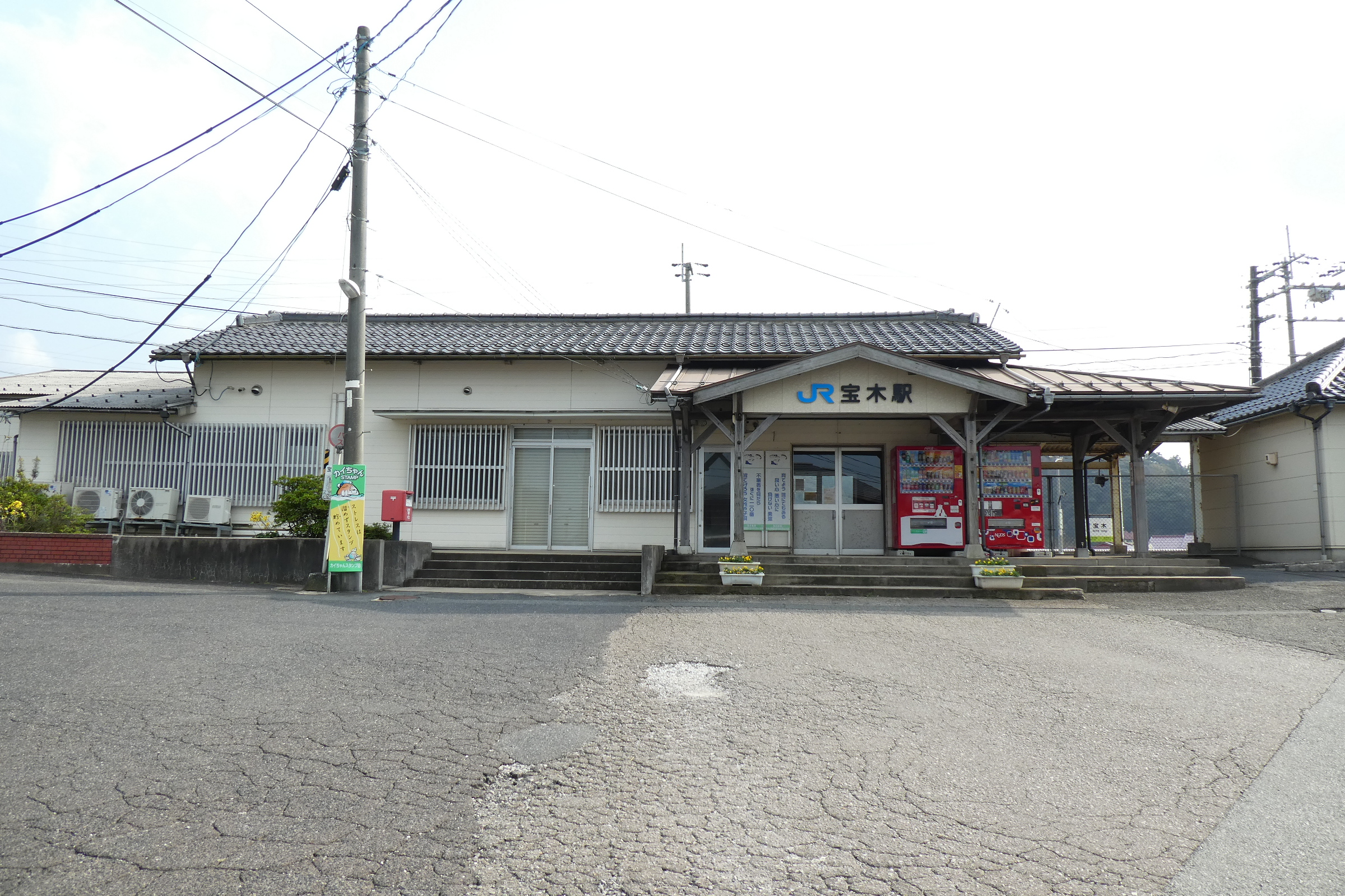 山陰本線 宝木駅